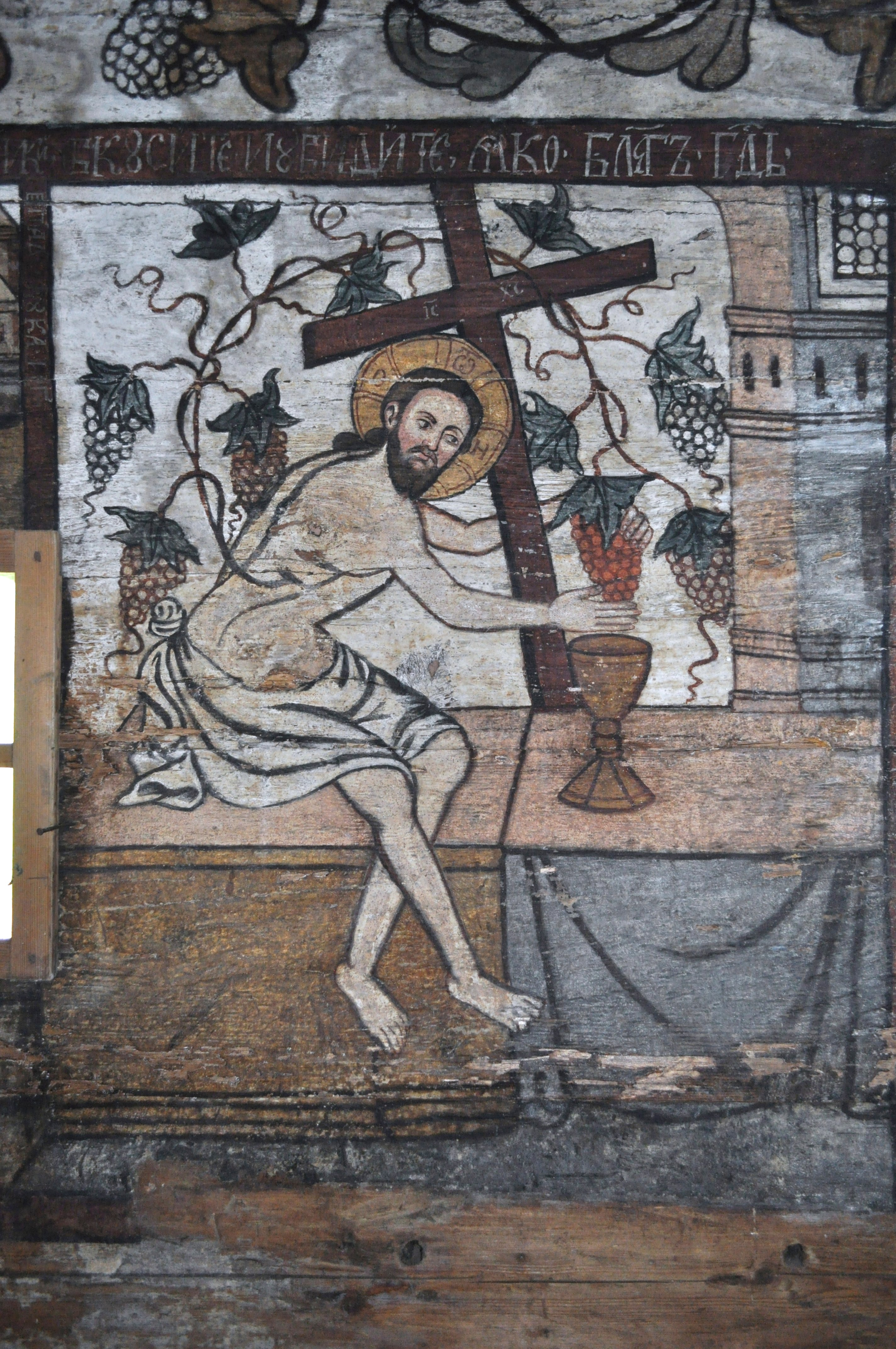 Biserica de lemn "Sfântul Nicolae", sat BOGDAN VODĂ